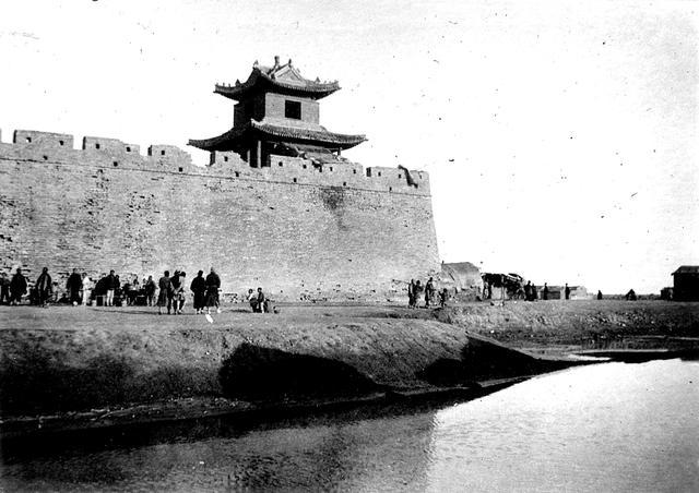 1900年前后的天津